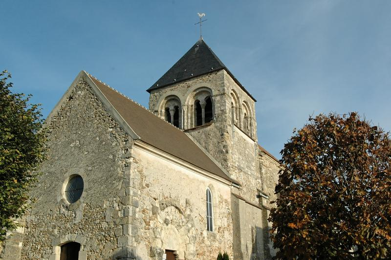 L'église de Celles les Condé.